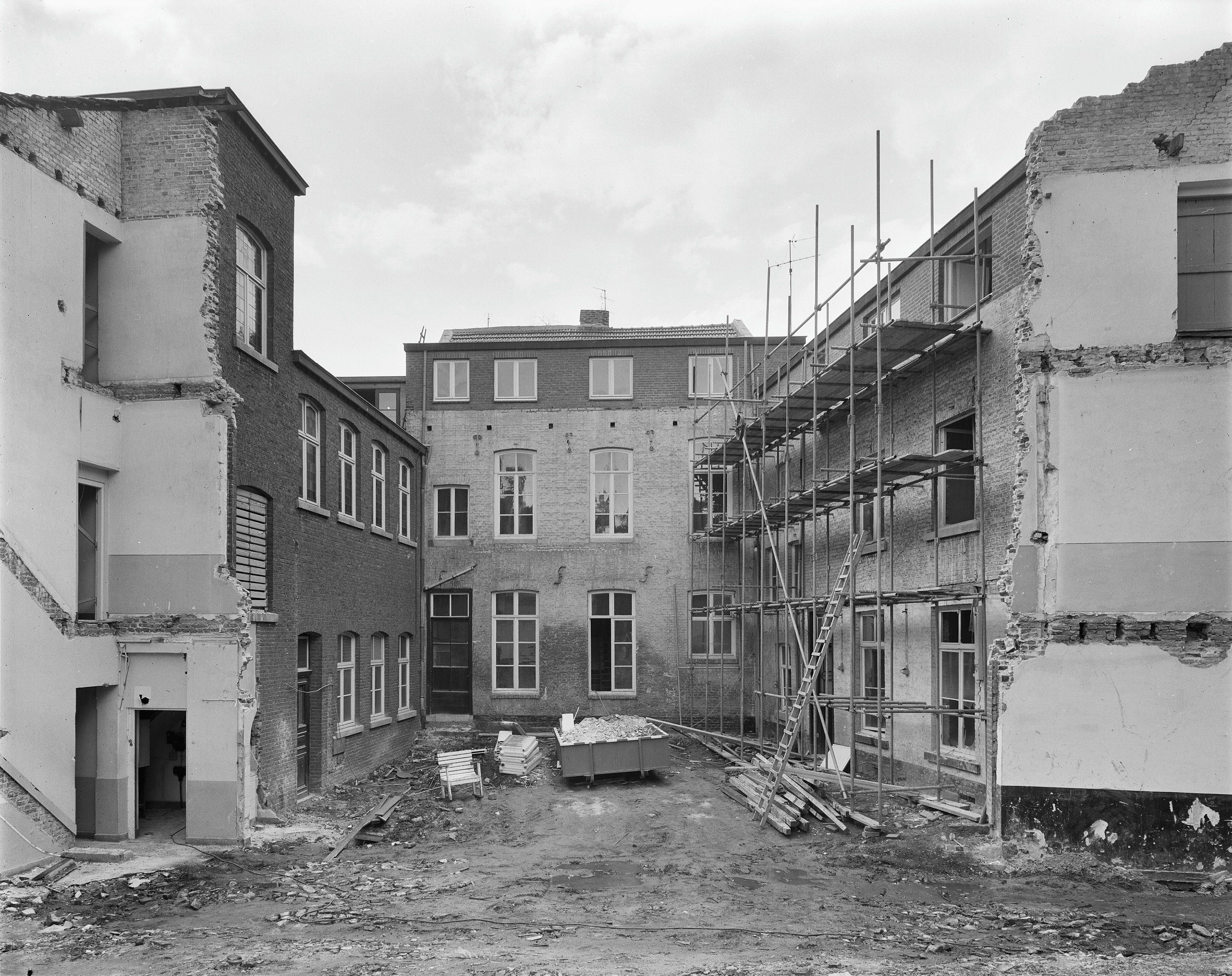 Klooster van de Zusters Reparatricen: binnenplaats